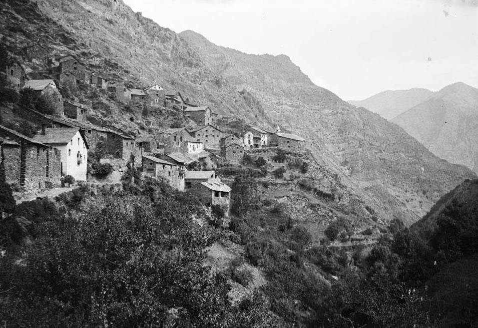 Imatge